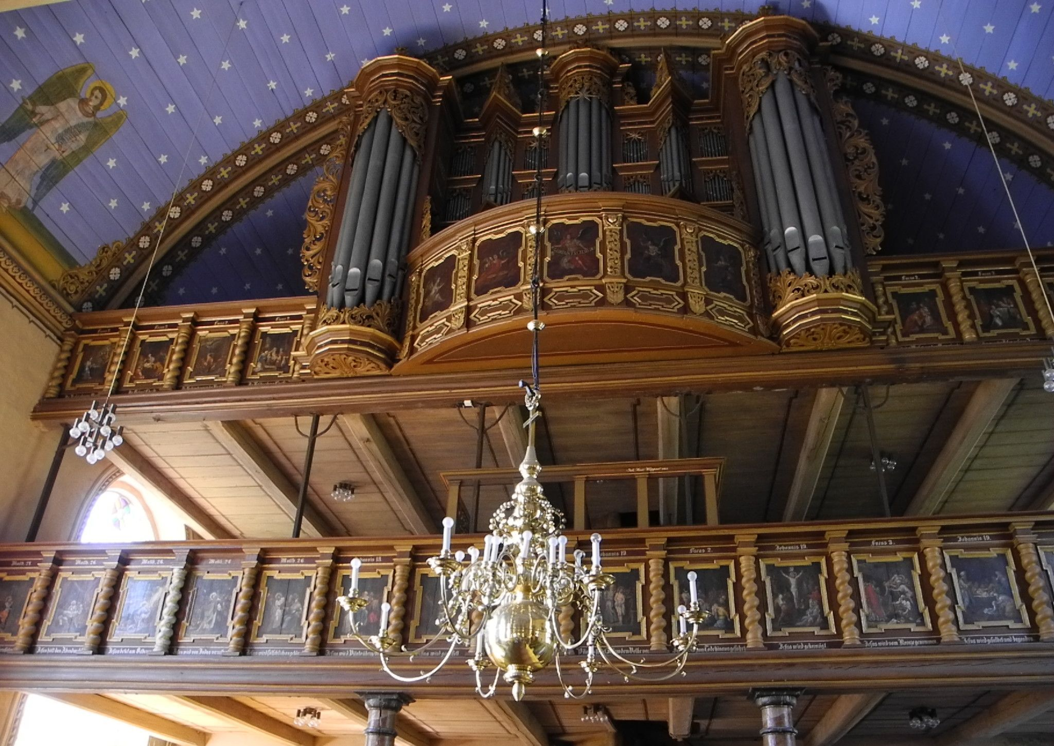 Jork - St.-Martini-Kirche in Estebrügge, Orgel